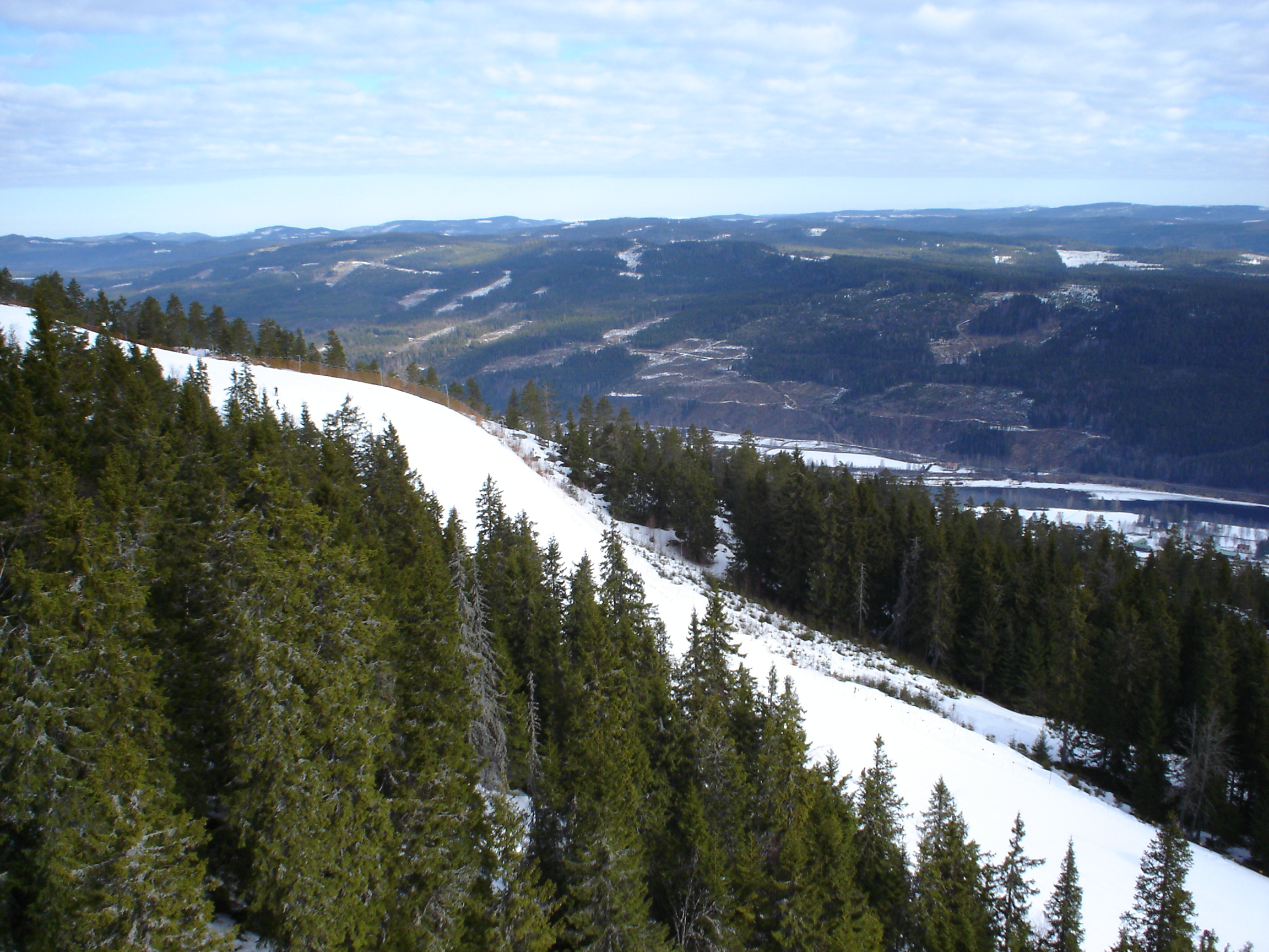 Branäs skidanläggning